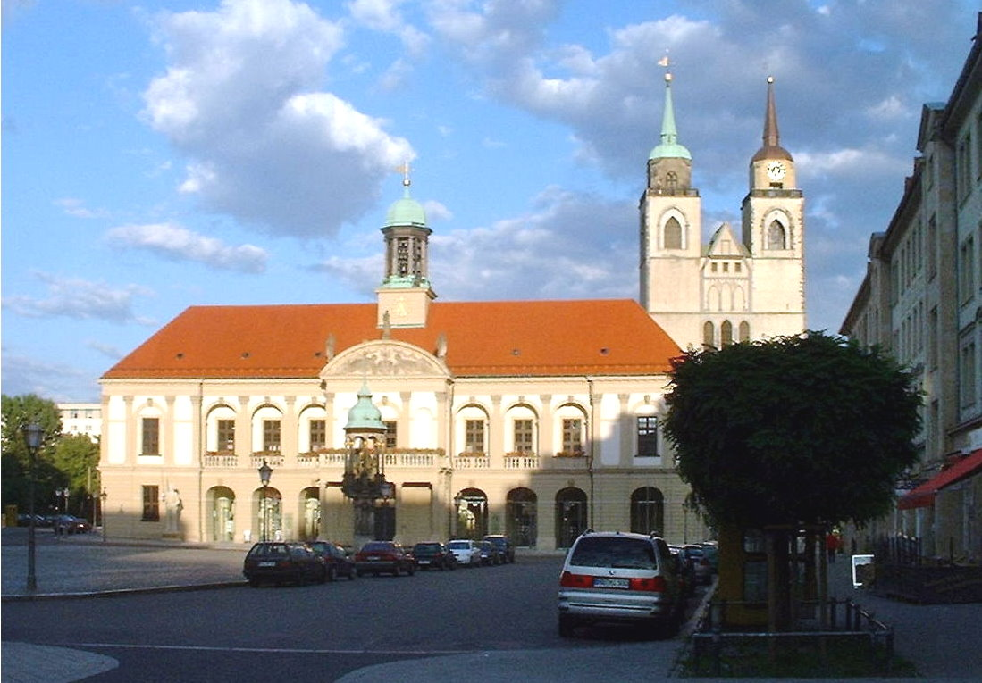 Magdeburger Rathaus am Alten Markt mit dem Magdeburger Reiter